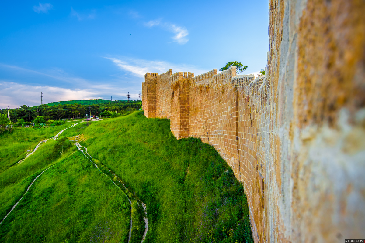 Стена цитадели Нарын-Кала